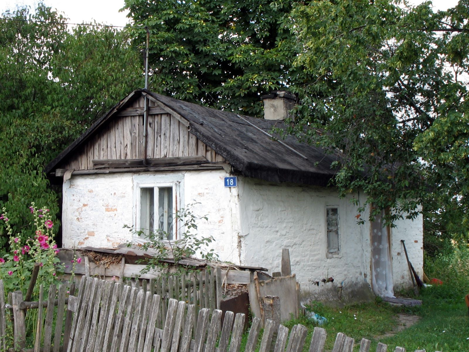 Koroszczyn (Poland) - "zagaty"